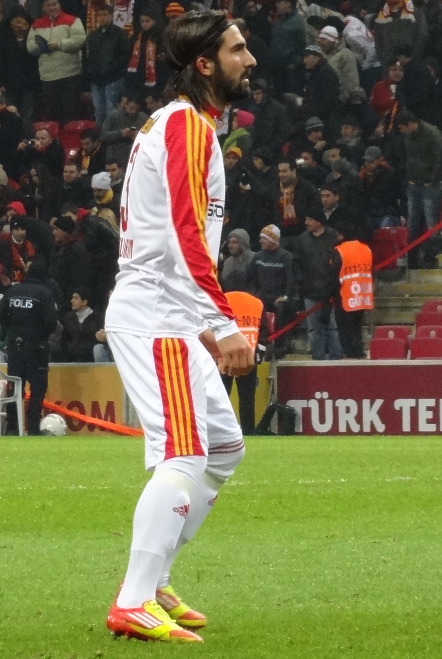 Hasan ali Galatasaray deplasmanında